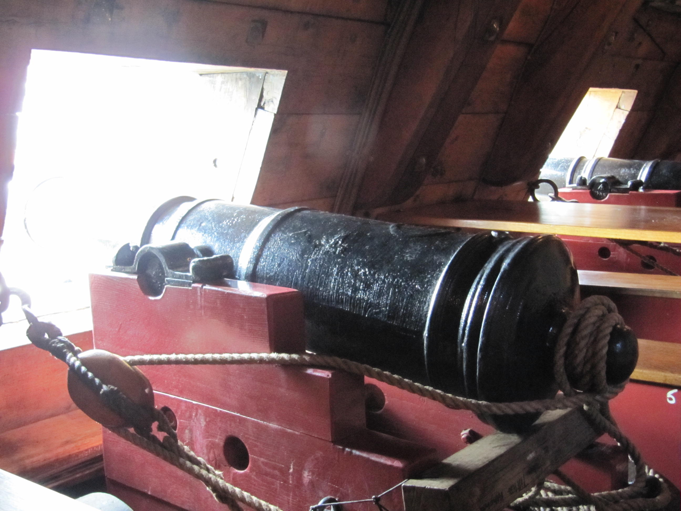 Le Götheborg à Tonnerres de Brest 2012, amarré en Penfeld